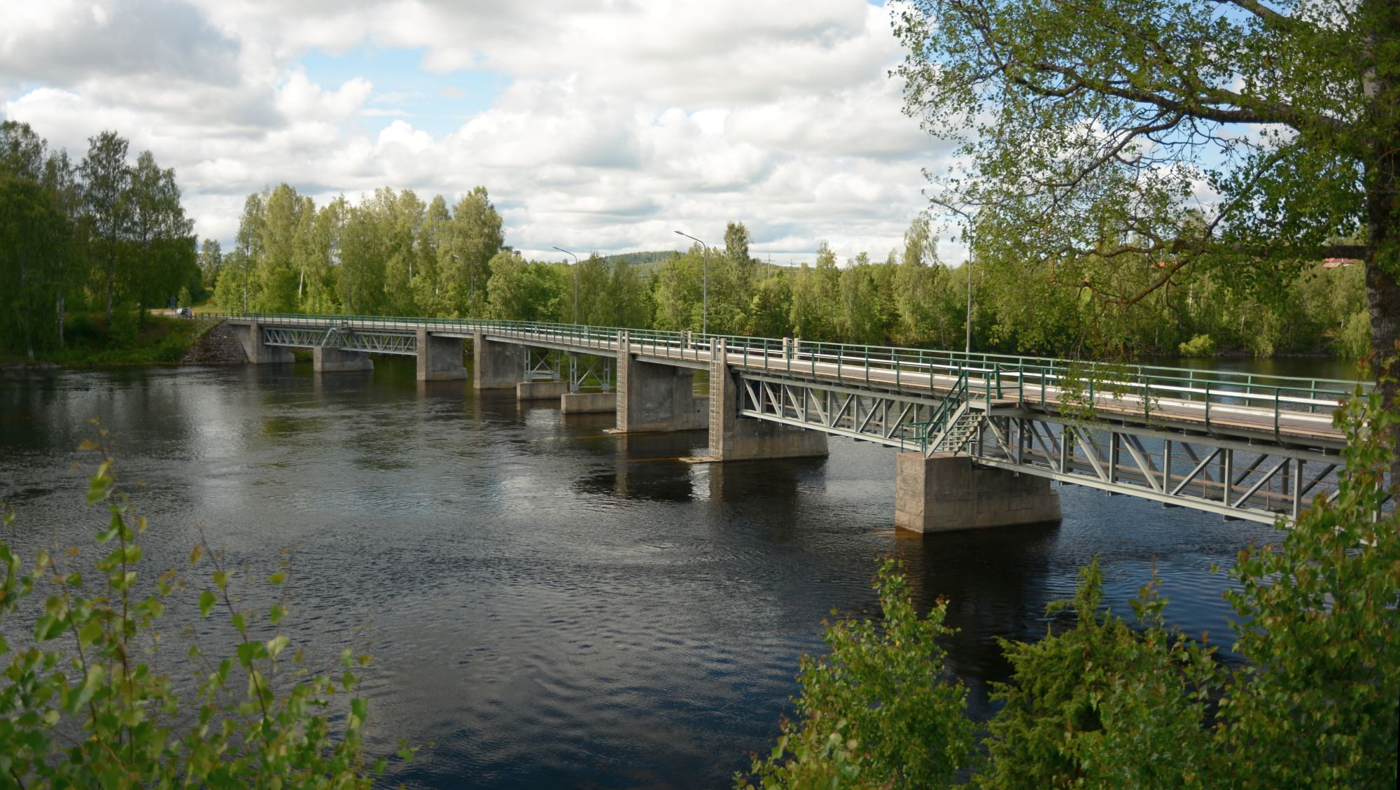 Marielundsbron över Österdalälven